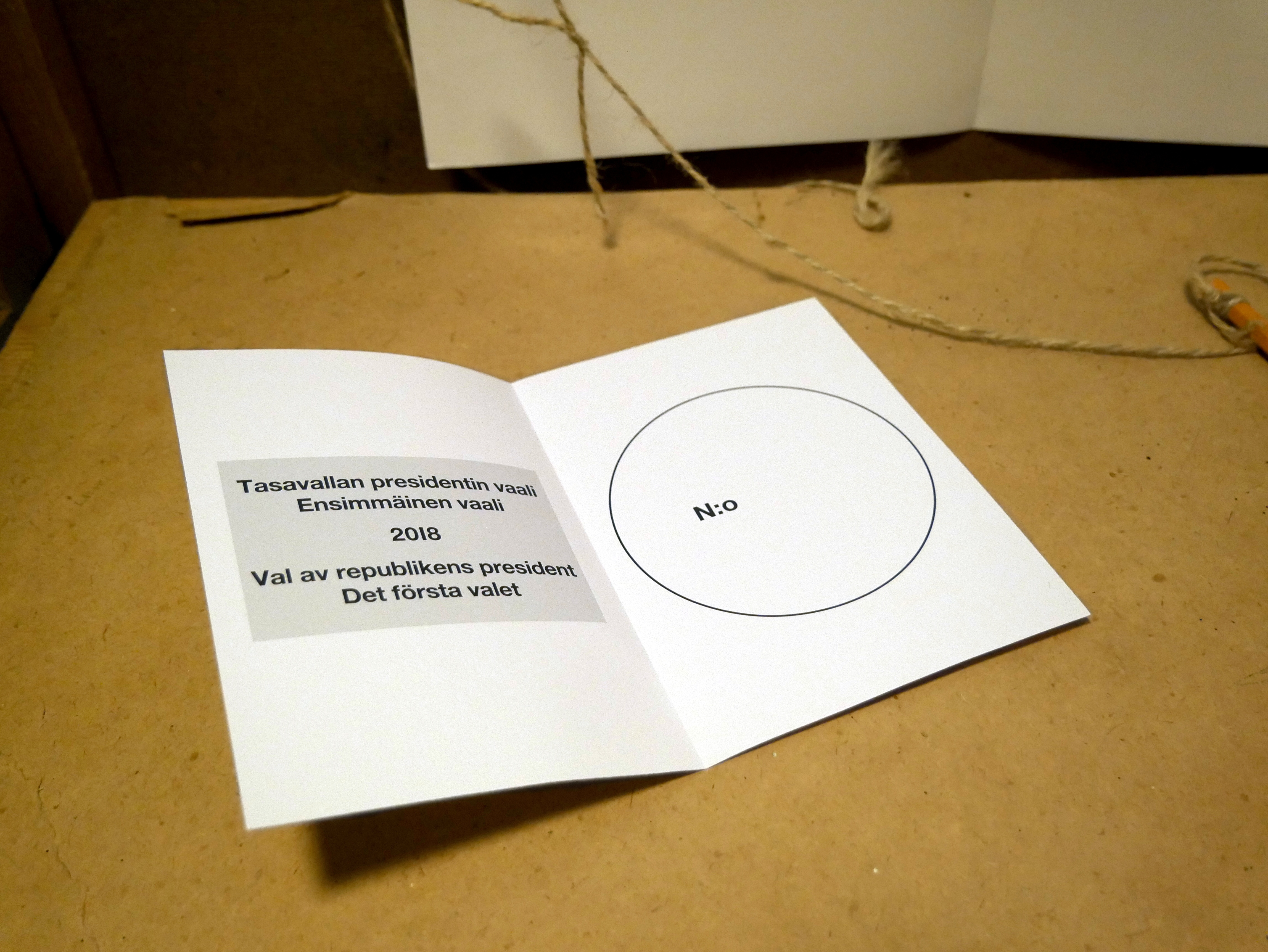 Presidentinvaalien 2018 äänestyslippu.